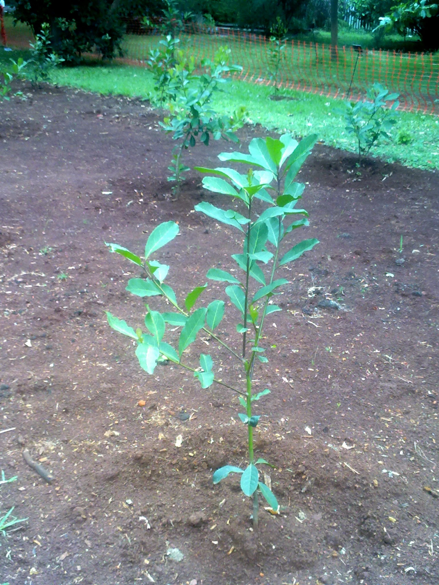 Interior del Ilex paraguariensis - Yerba mate en el Jardín Botánico de Buenos Aires, Argentina. Argentina.